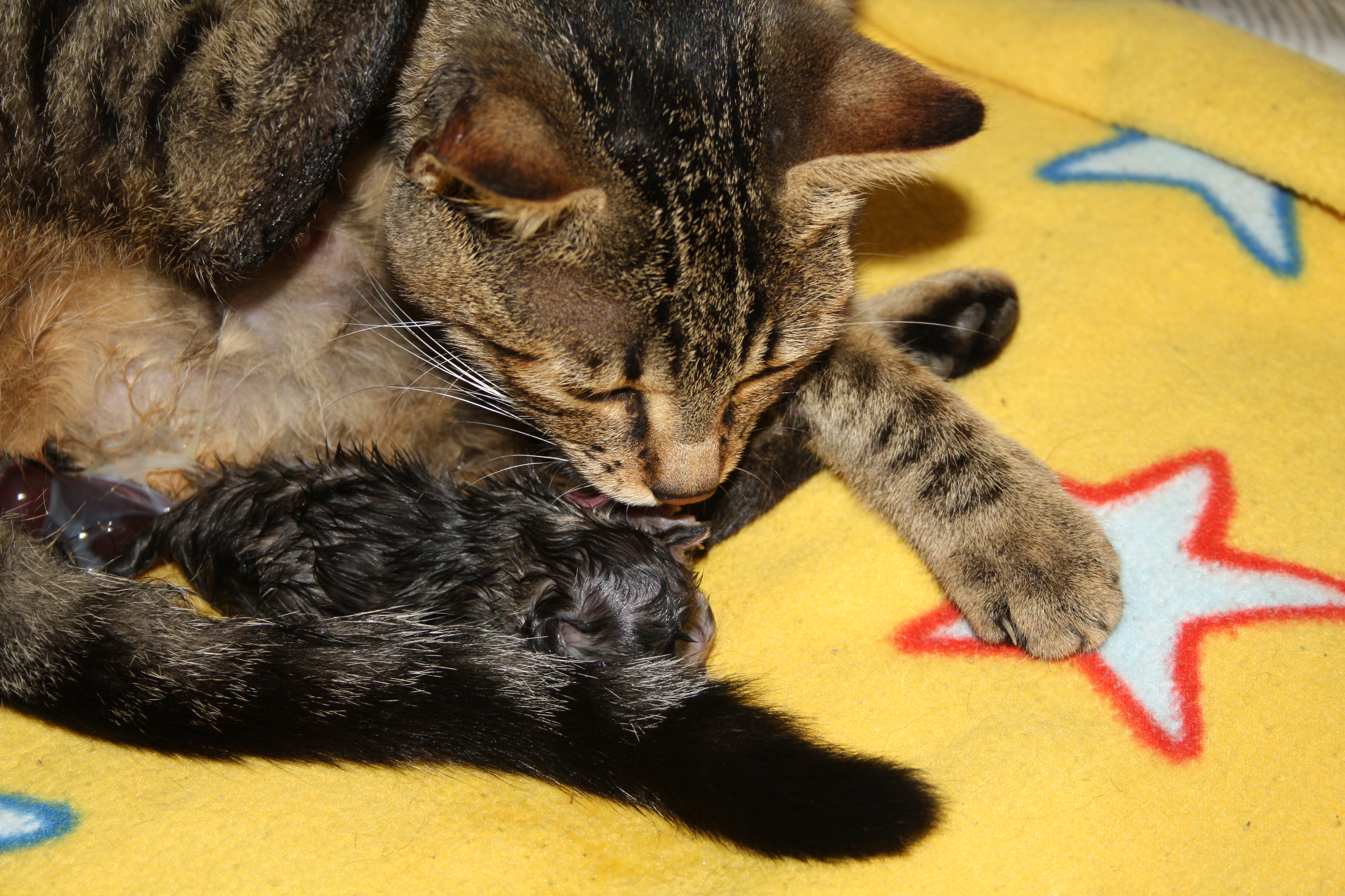 Gattino appena nato, la madre lo sta ancora ripulendo.